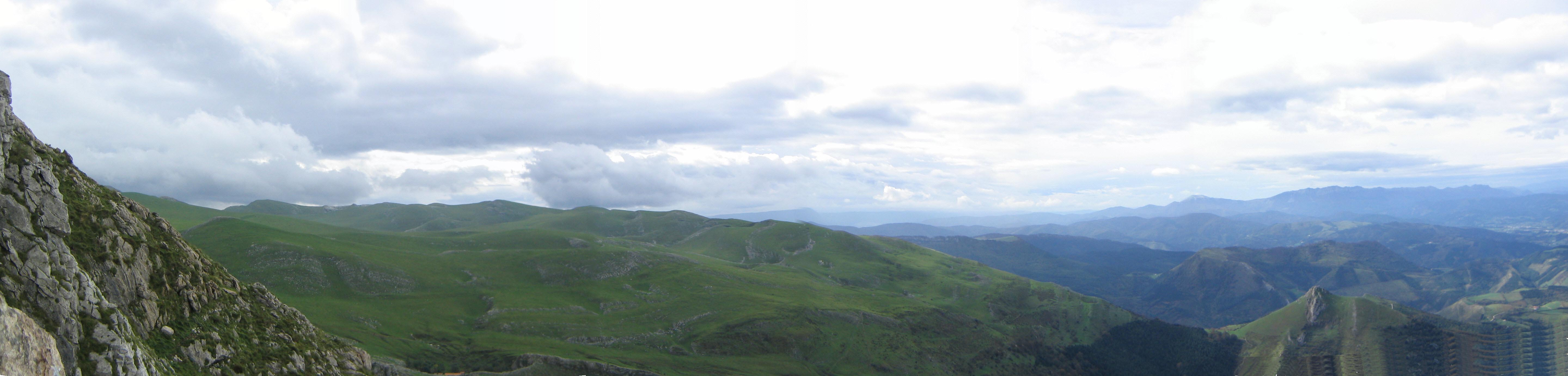 Campas de Aralar desde el Txindoki, Guipúzcoa, País Vaco, España.